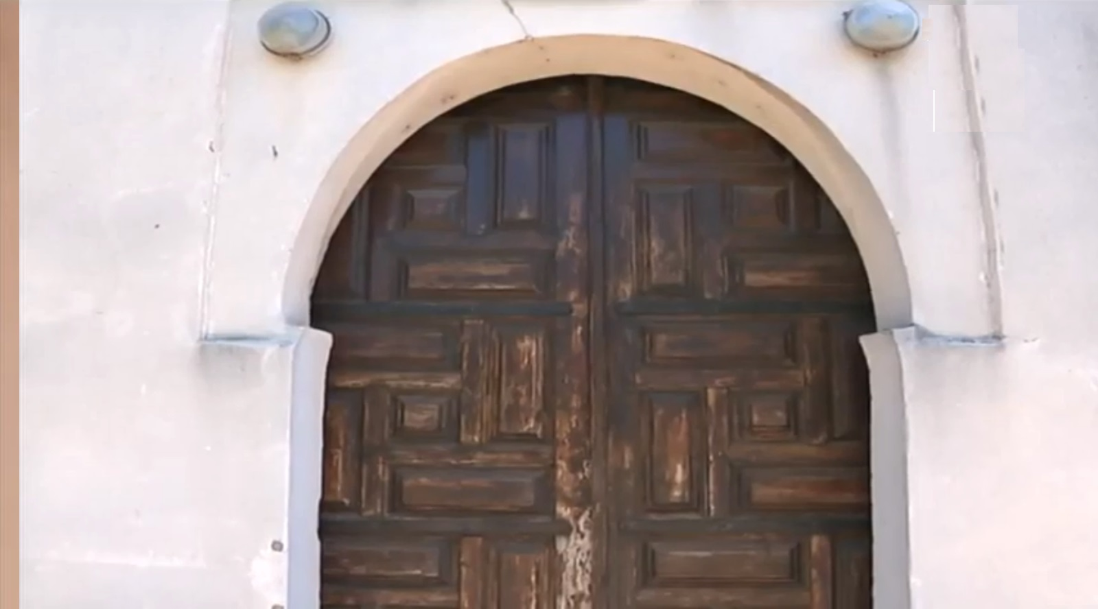 Porte Mosquée Djamâa Aâdham de la Casbah de Béjaïa باب مسجد الجامع الأعظم في قصبة بجاية